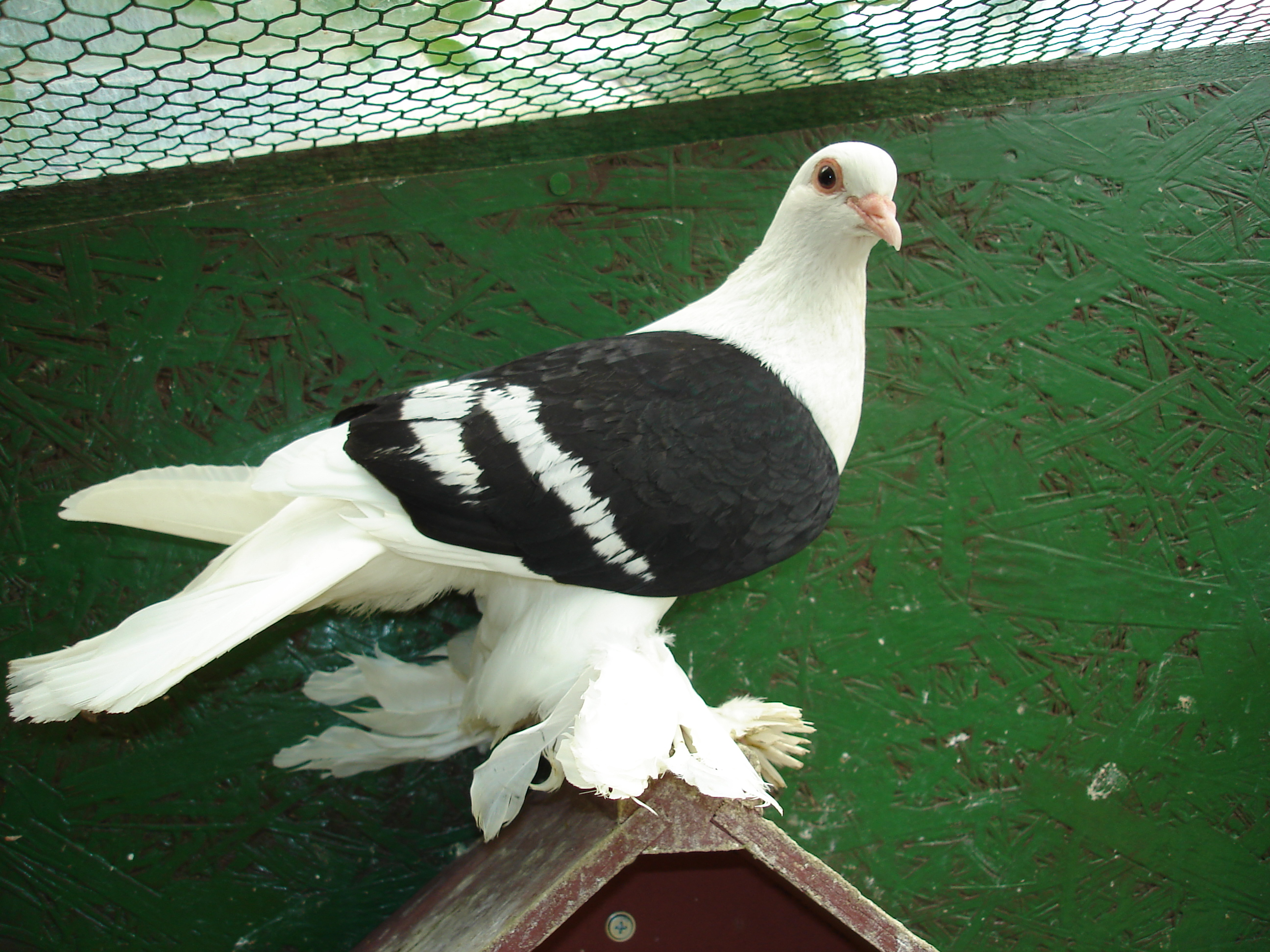 Zdjęcie saksońskiego tarczowego